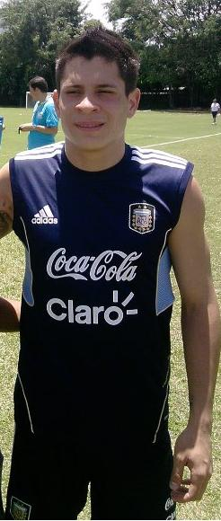 Juan Iturbe en el mundial sub 20 de la FIFA colombia 2011